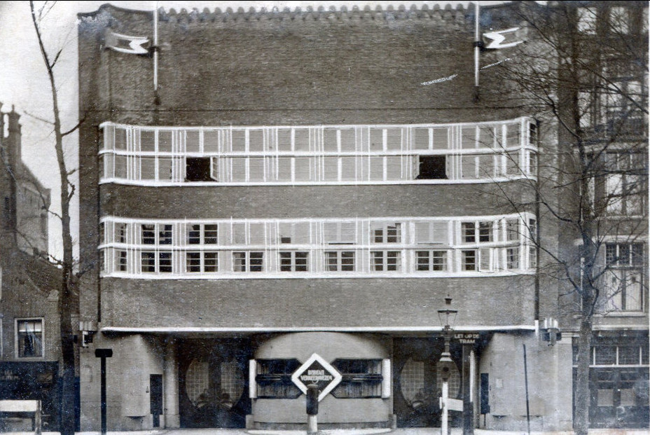 Gebouw Verkeerspolitie. Overtoom Amsterdam P. W. 1924.